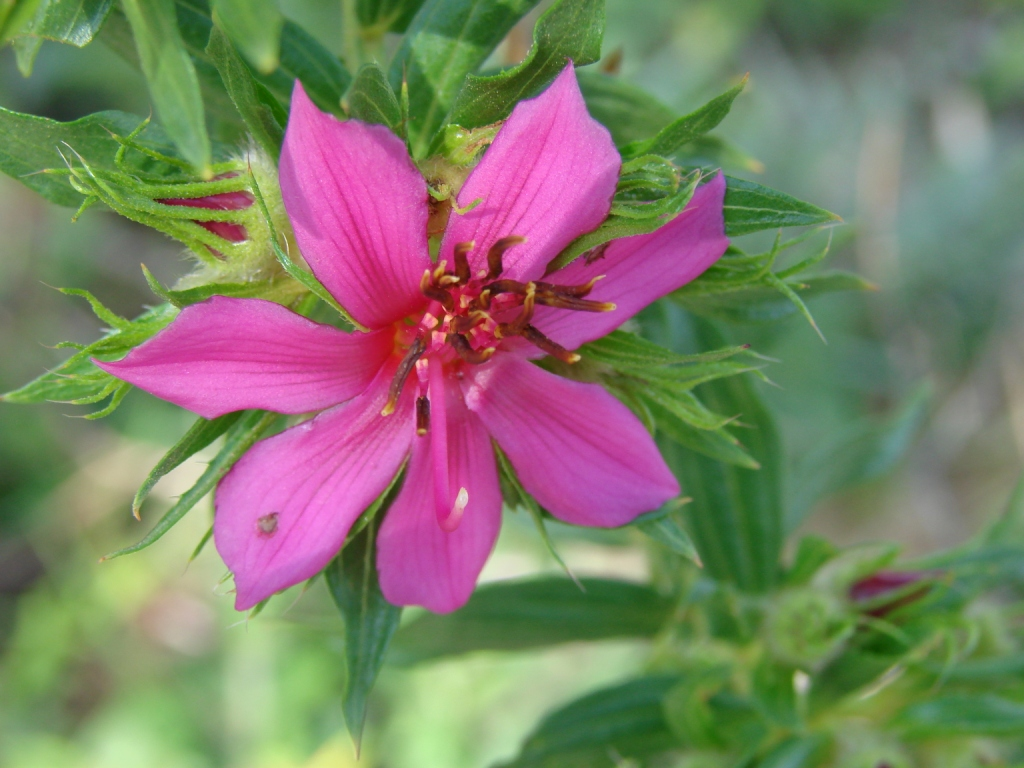 Stenodon gracilis - MELASTOMATACEAE Parque Nacional da Chapada dos Veadeiros - Povoado São Jorge - Alto Paraíso de Gioás - Goiás - Brasil.